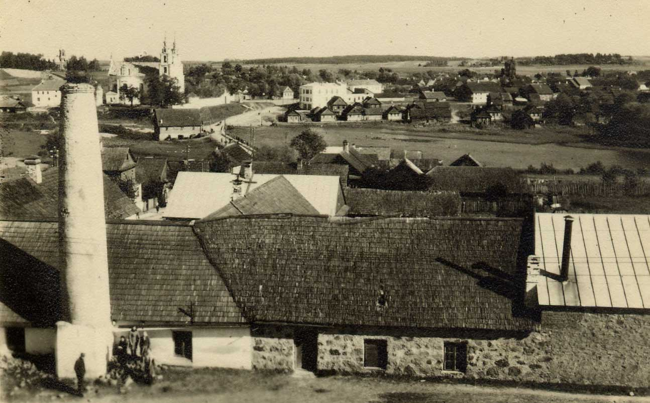 Беларуская (тарашкевіца): Івянец (Ivianiec), рака Волма (Vołma)